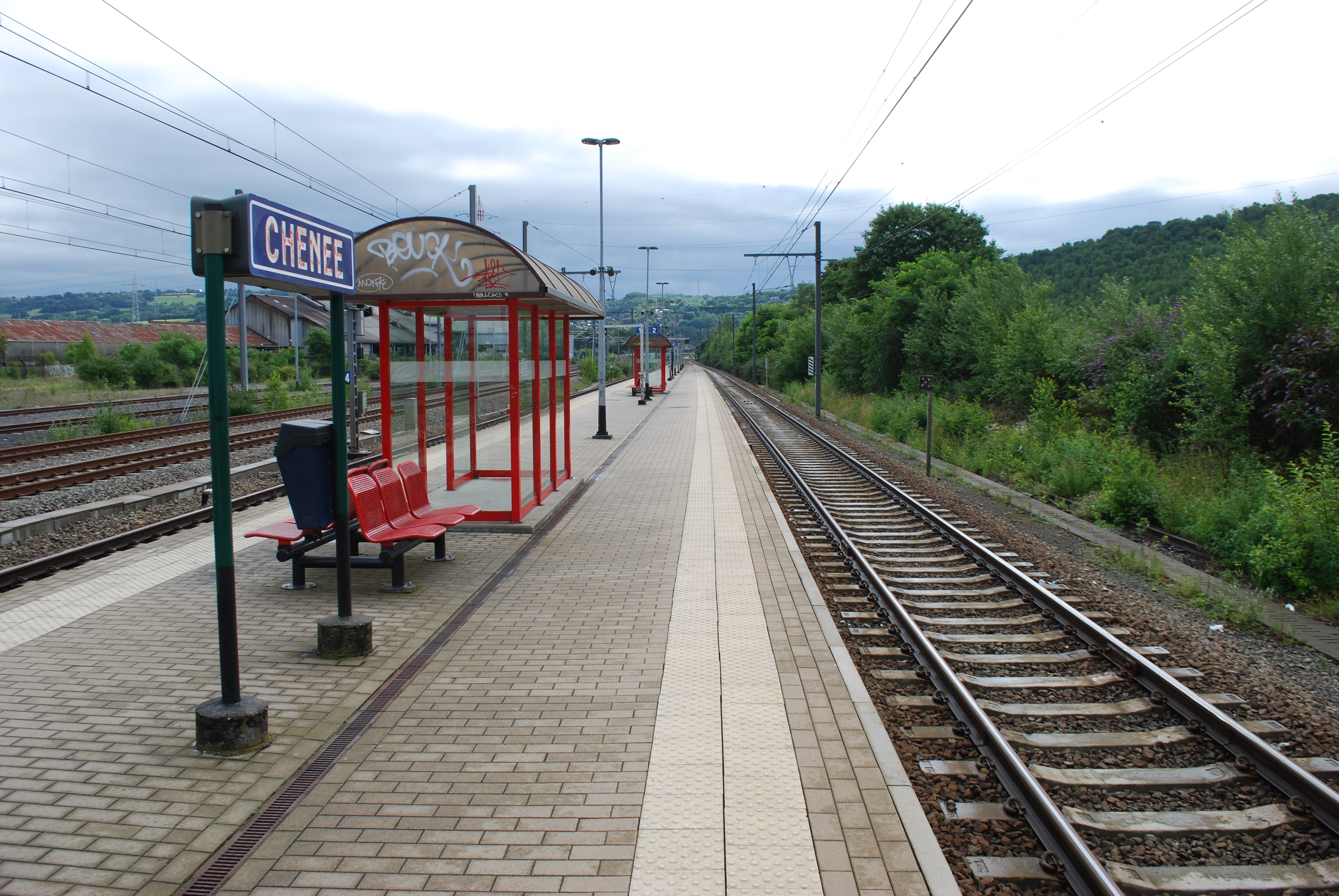 Vue de la gare de Chênée (Liège).